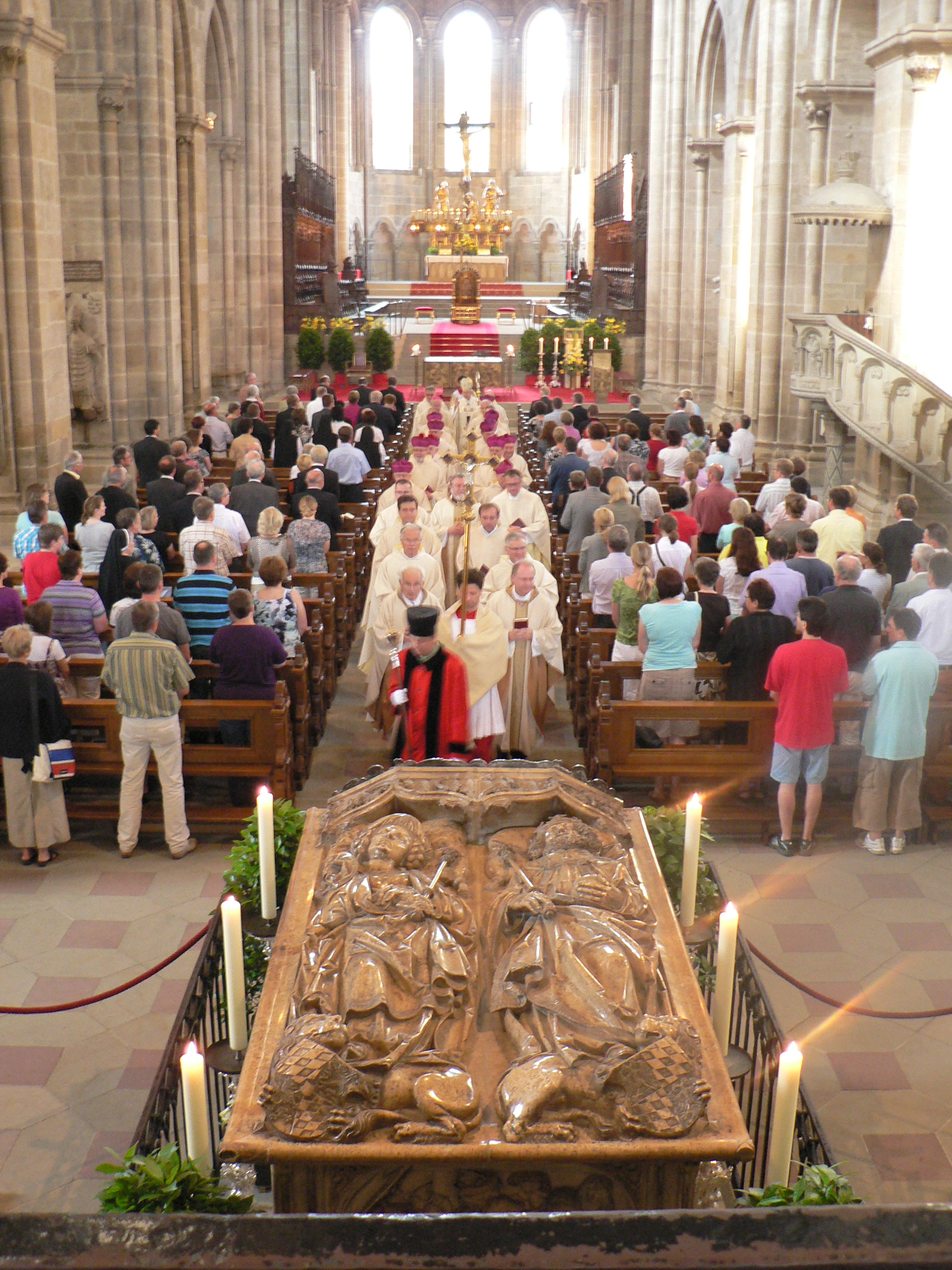 eigene Datei